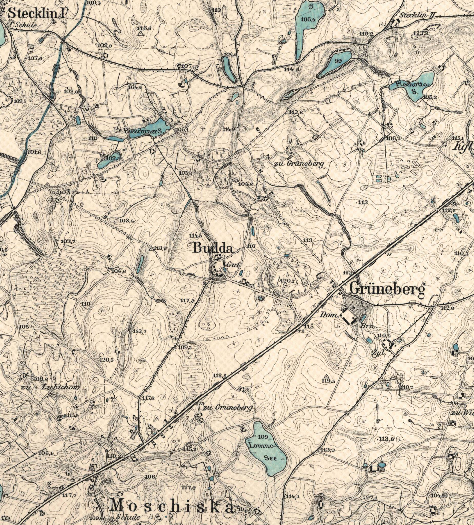 Karte Budda und Umgebung 1908, Westpreußen. Heute: Budy in der polnischen Gemeinde Lubichowo, Powiat Starogardzki der Wojewodschaft Pommern